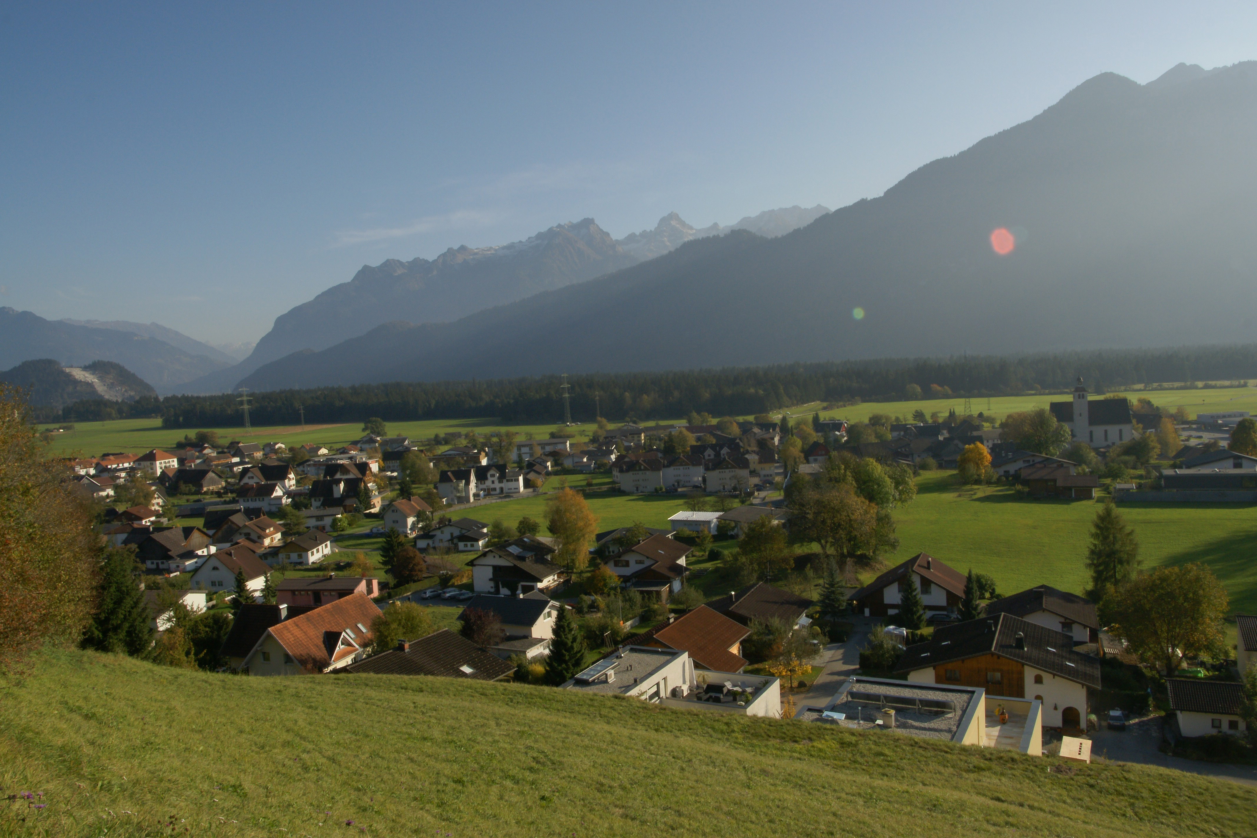 Blick über Bludesch auf die Zimba.